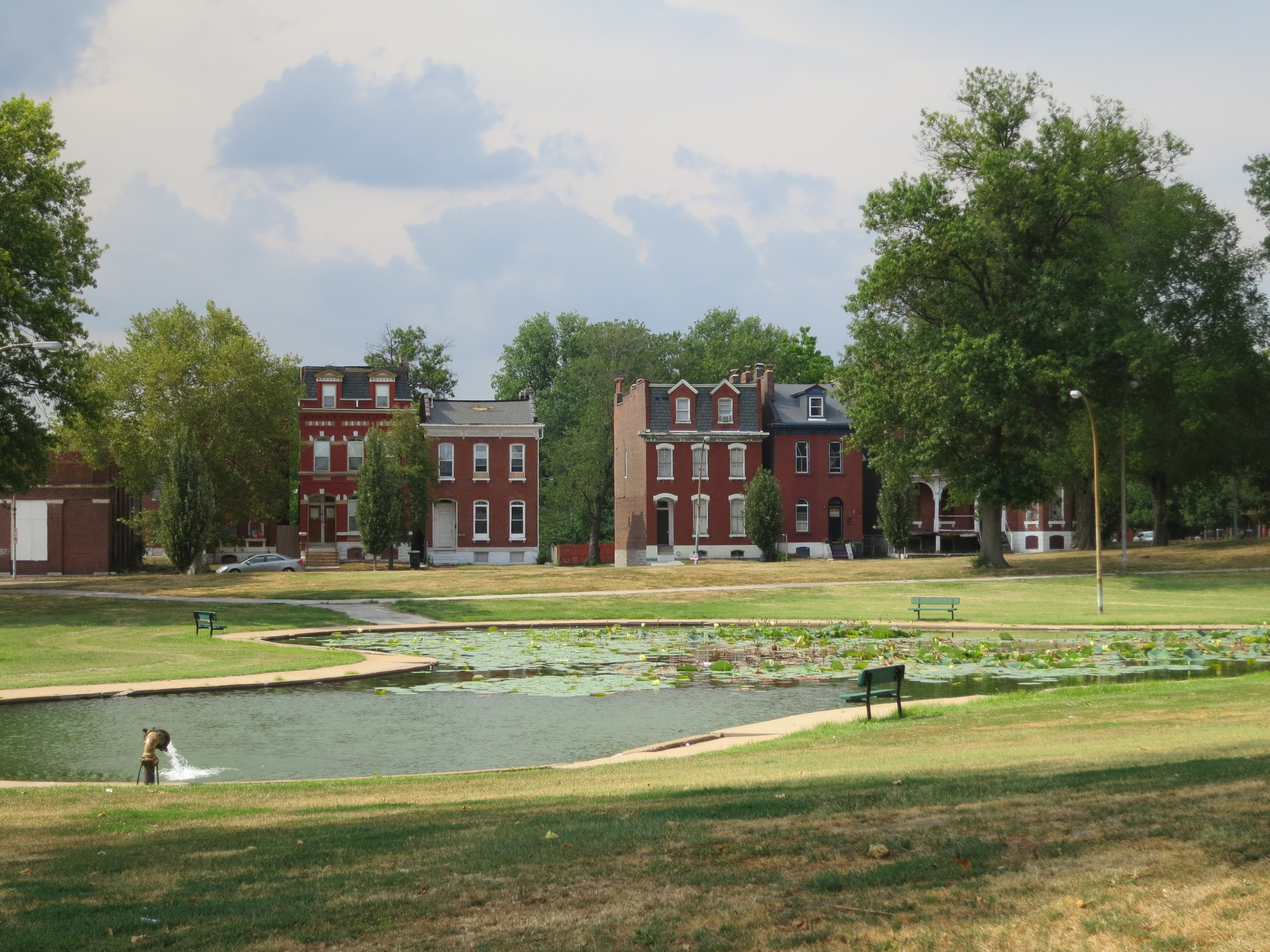 Hyde Park